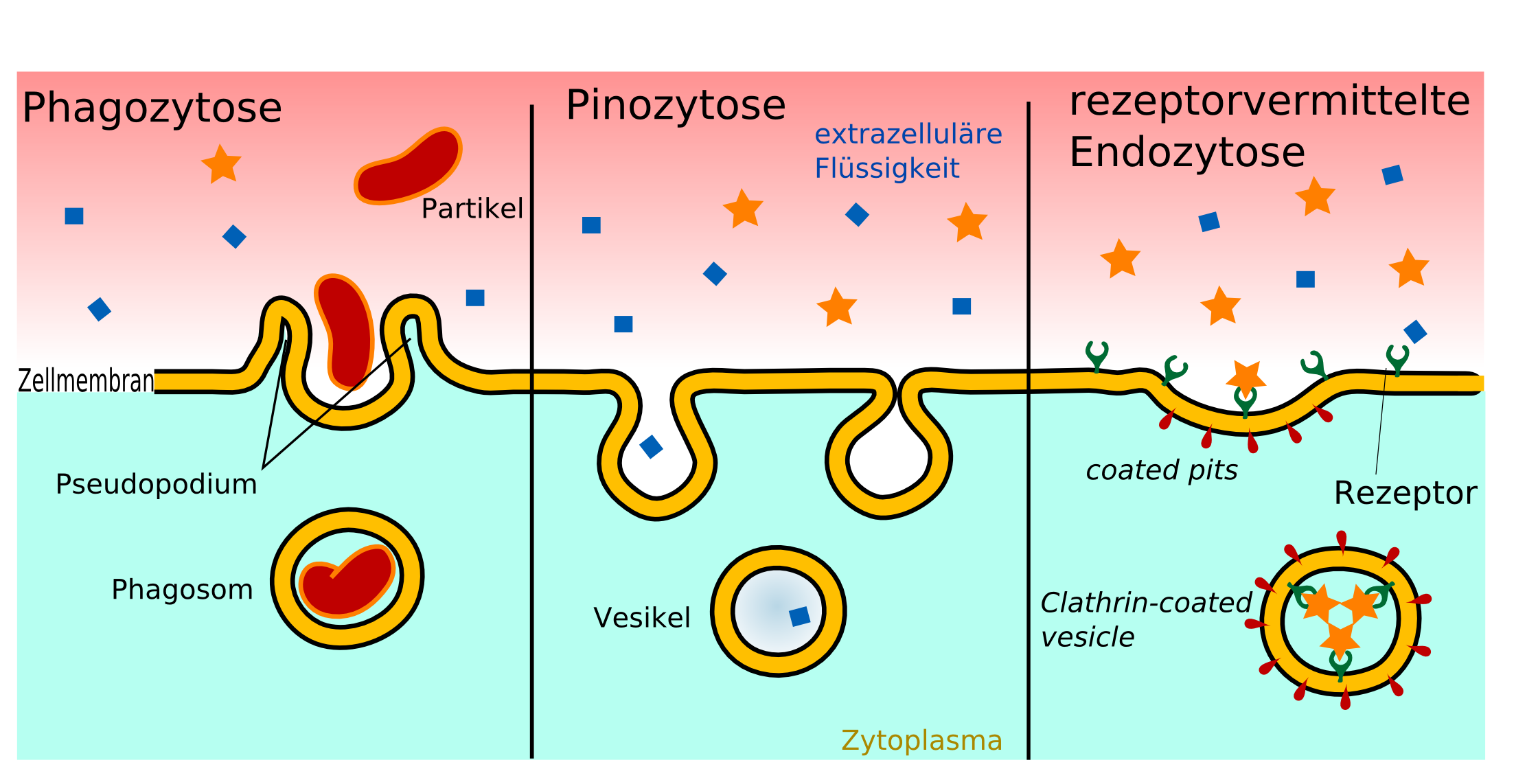 Schematische Darstellung von drei Arten der Endozytose.